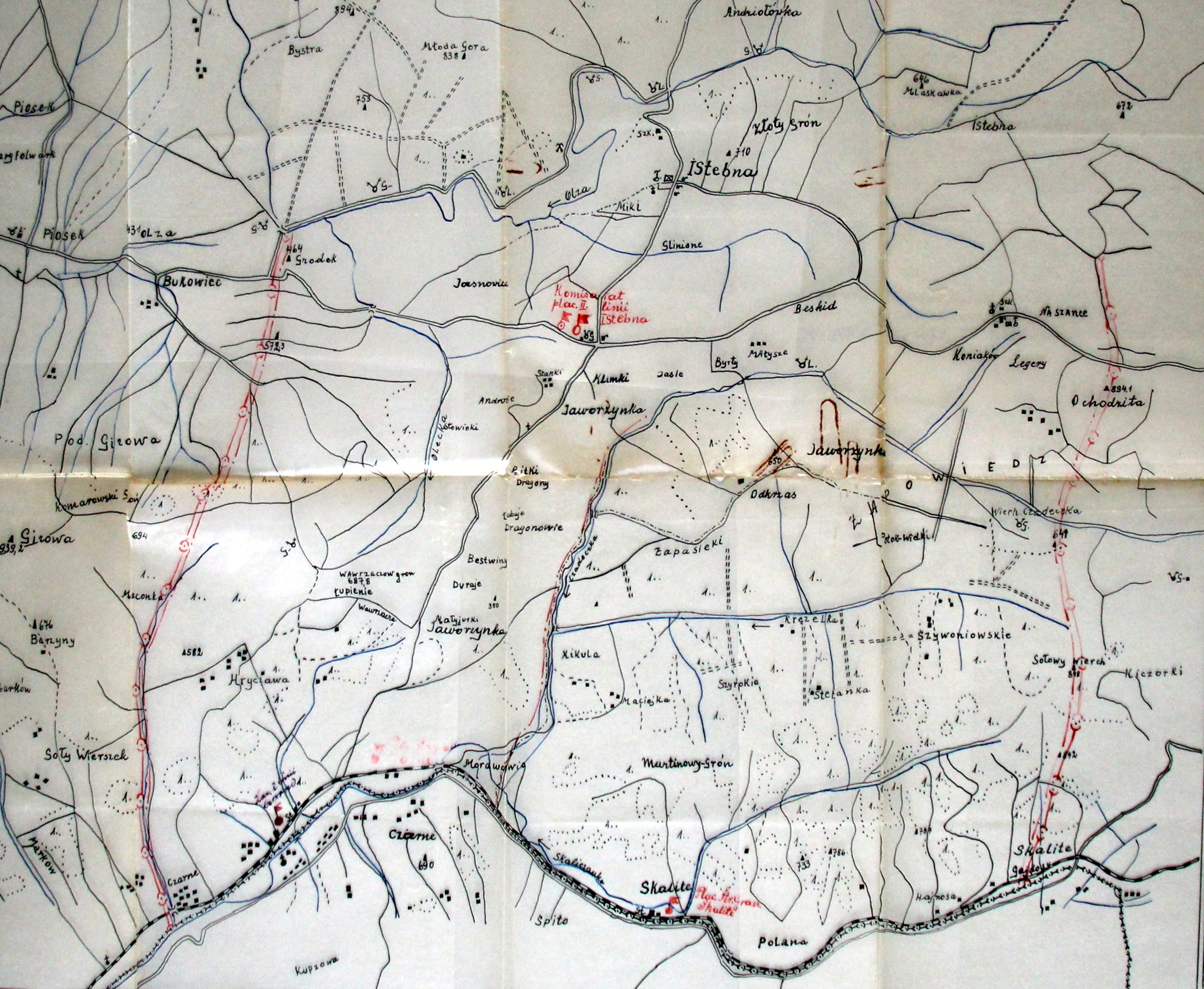 Szkic komisariatu SG Istebna - lata 30. XX wieku